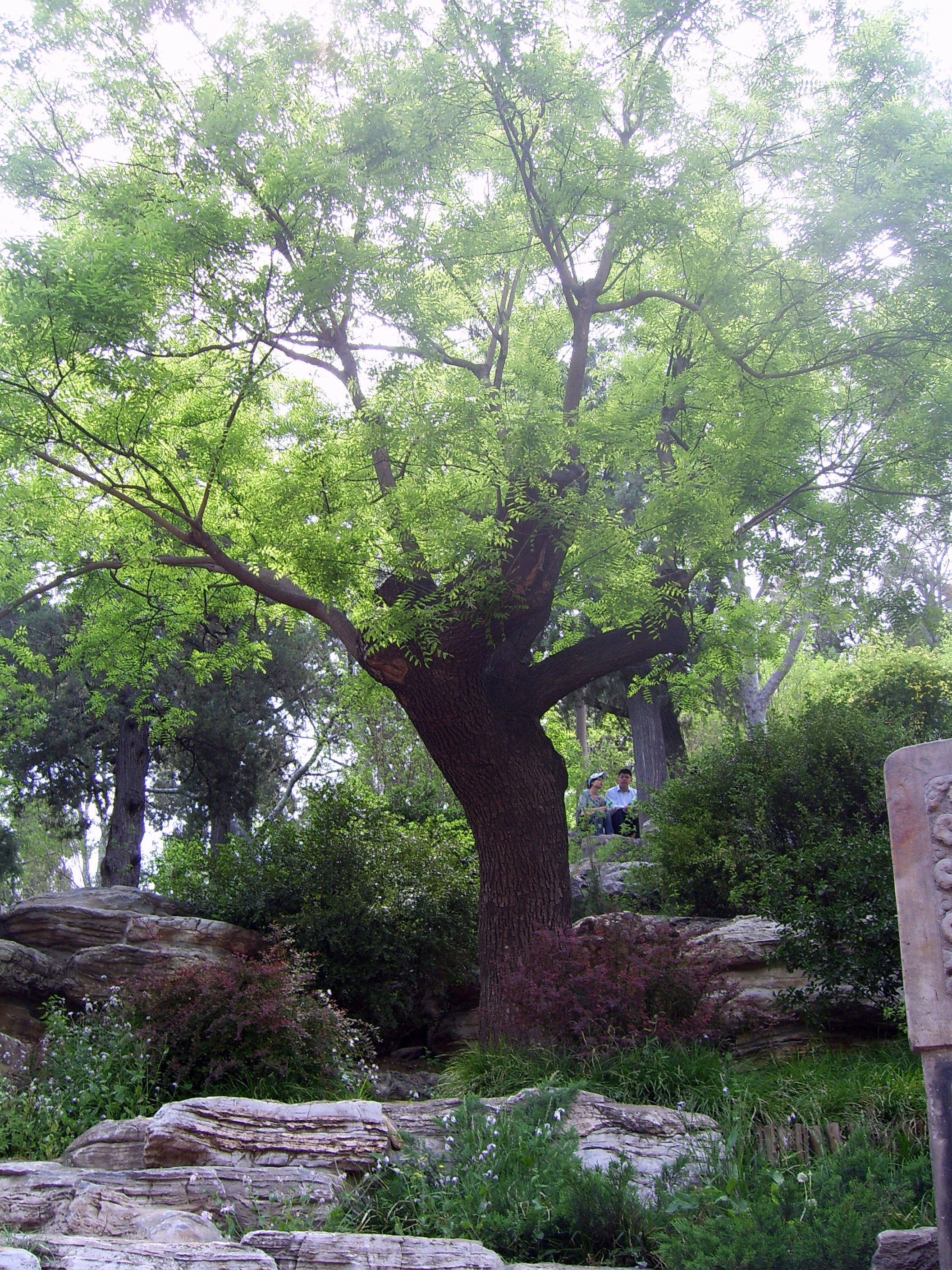 景山公园的歪脖老槐树，传为崇祯皇帝上吊处。此树为后栽。